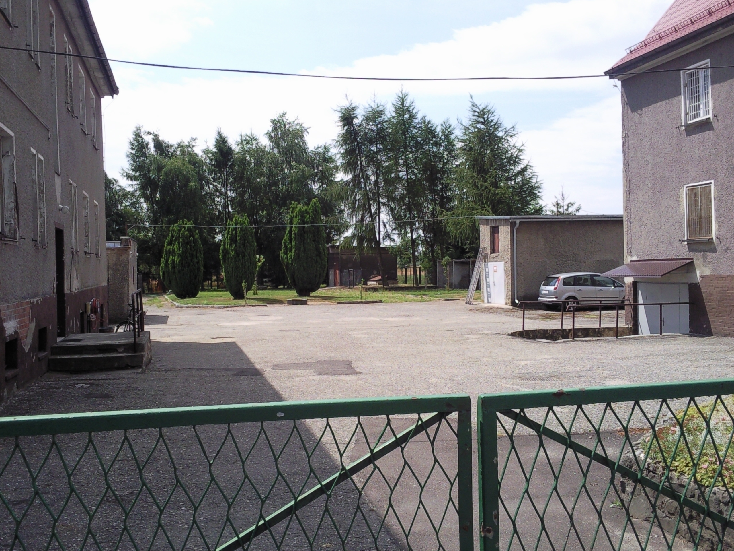 Chałupki, dawna Strażnica Wojsk Ochrony Pogranicza i Straży Granicznej w Chałupkach – plac strażnicy